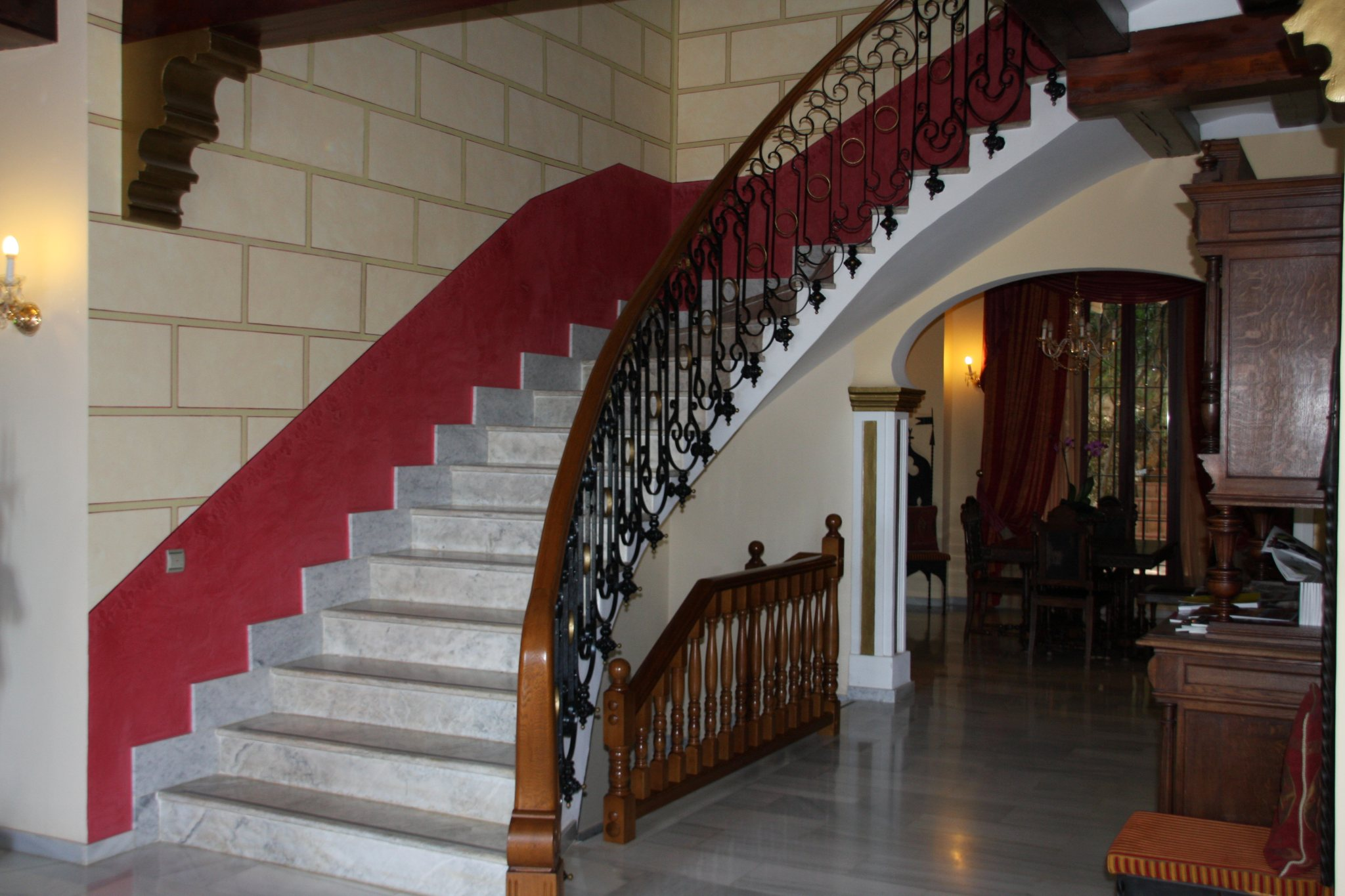 photos by Javier Rodríguez García